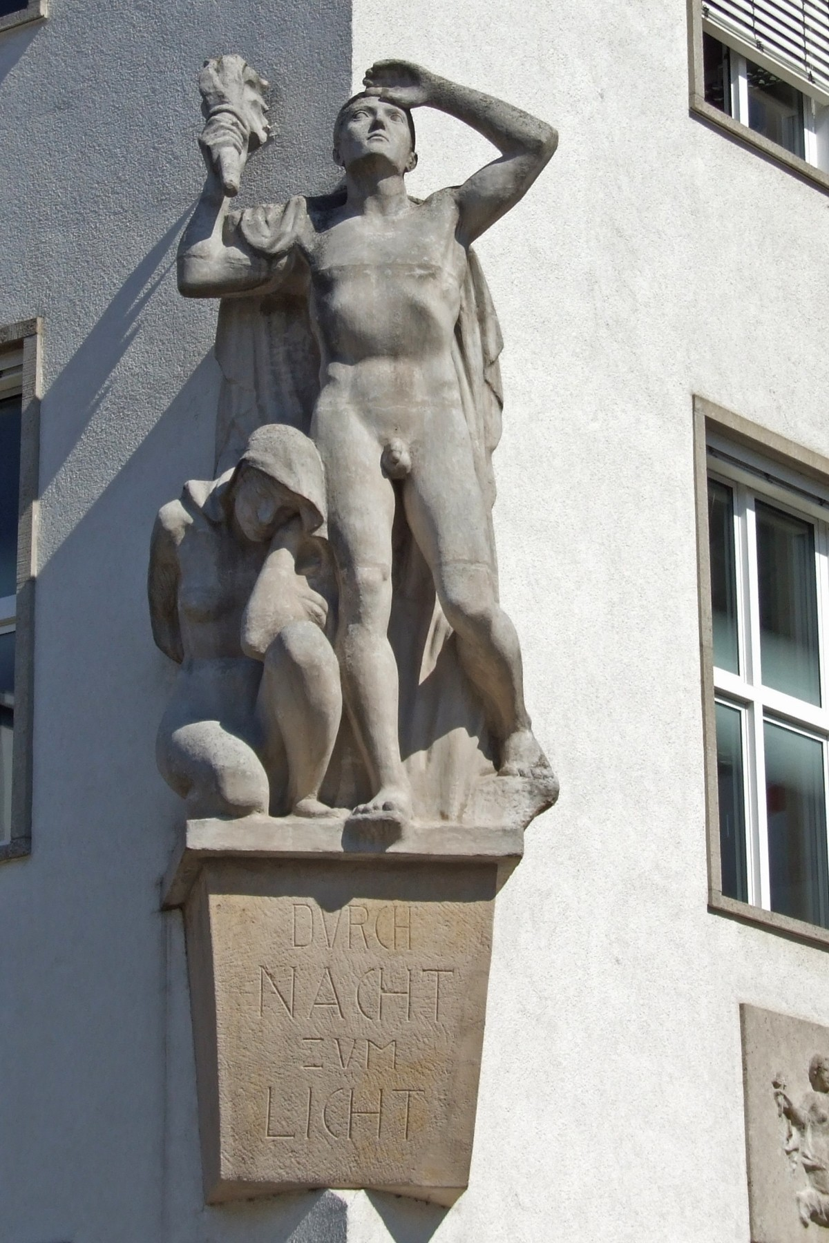 Figurengruppe "Durch Nacht zum Licht" von Joseph Wackerle am alten Zeiss-Hochhaus in Jena